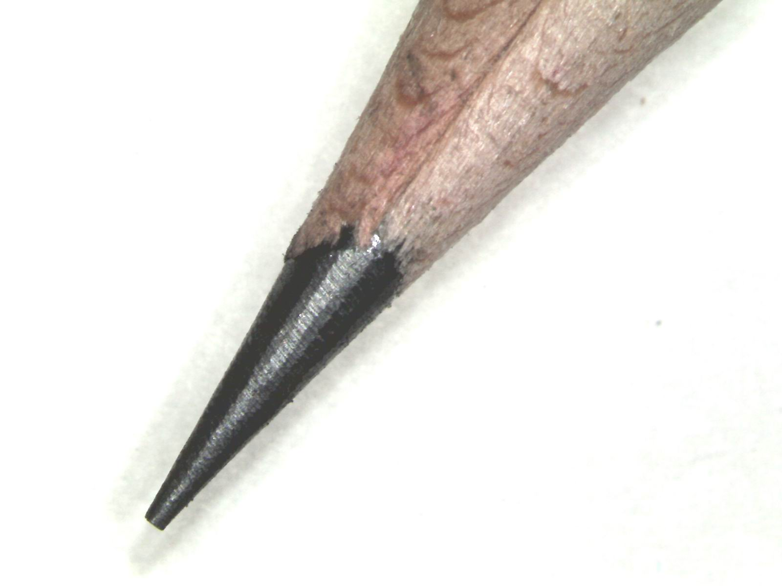 Bleistiftspitze bei 35facher Vergrößerung